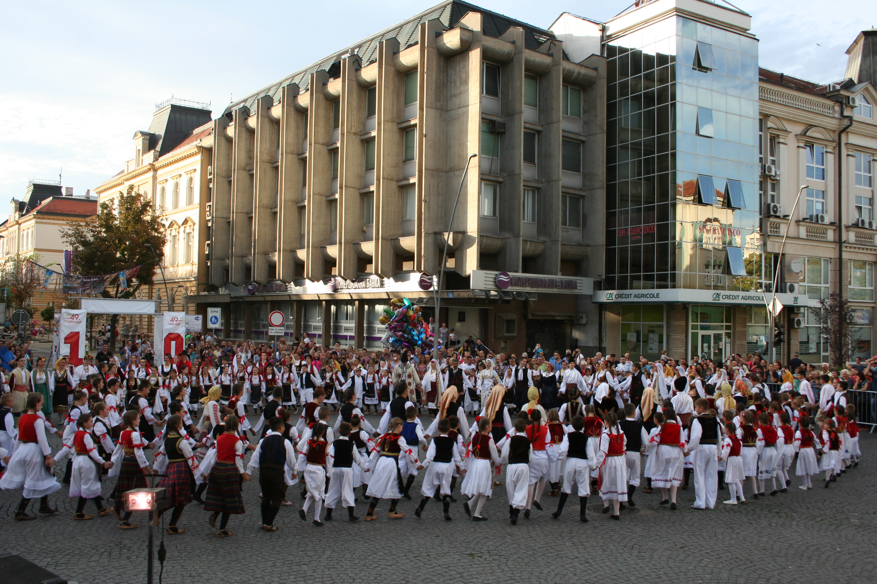 Šabačko kolo